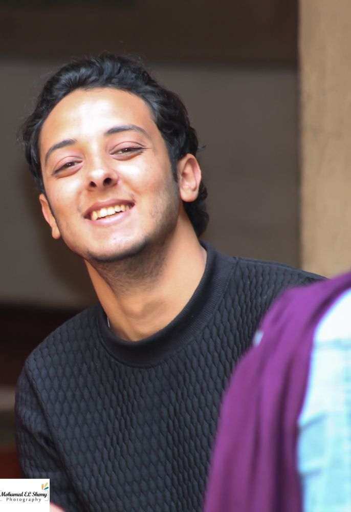 اشرف خلف